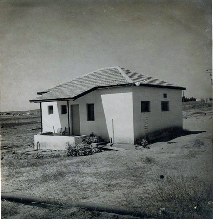 בית ברטשניידר, הראשון בכפר בני ציון התמונה לקוחה מתוך אתר כפר בני ציון מעלה ויוצר התמונה הסכים לשחרר תחת הרישיון האמור מעלה.